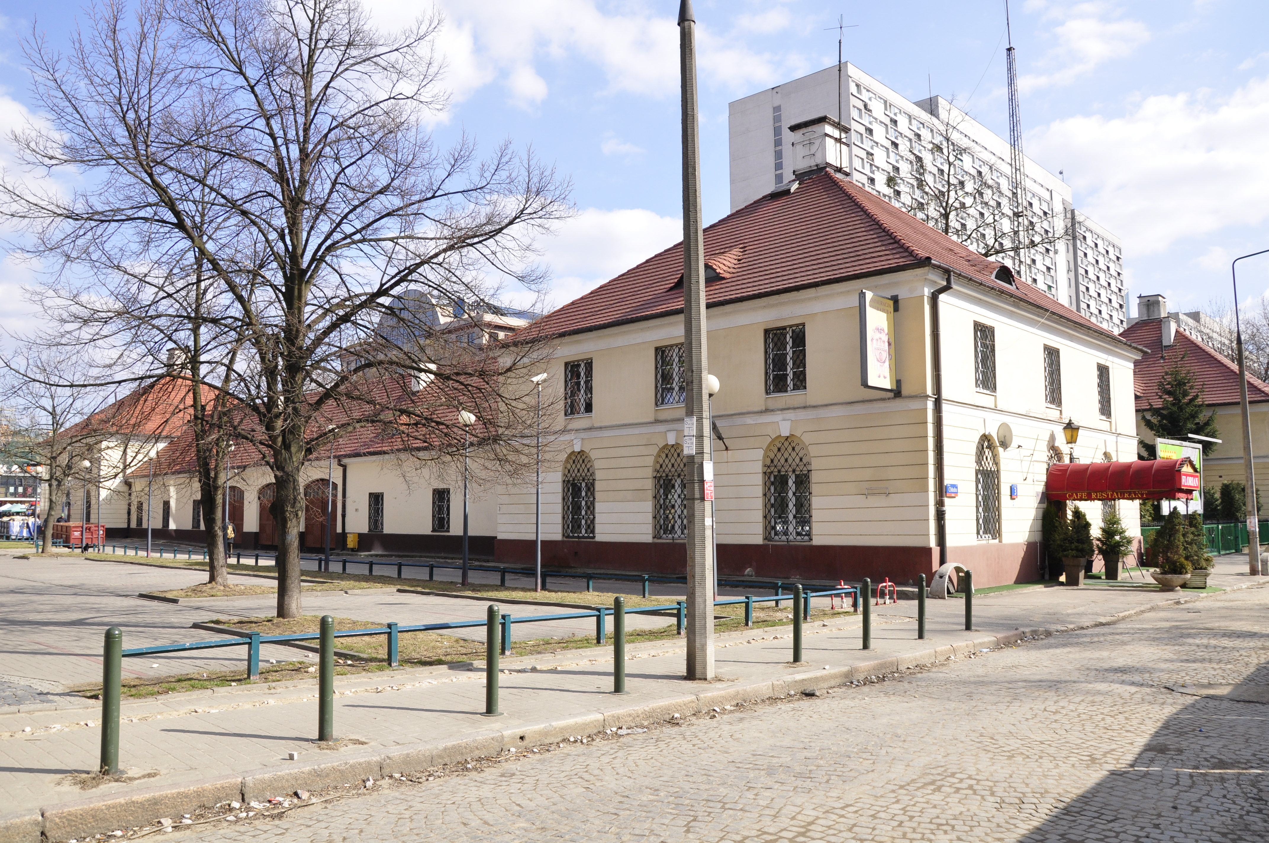 Feuerwehr Wola, Warschau